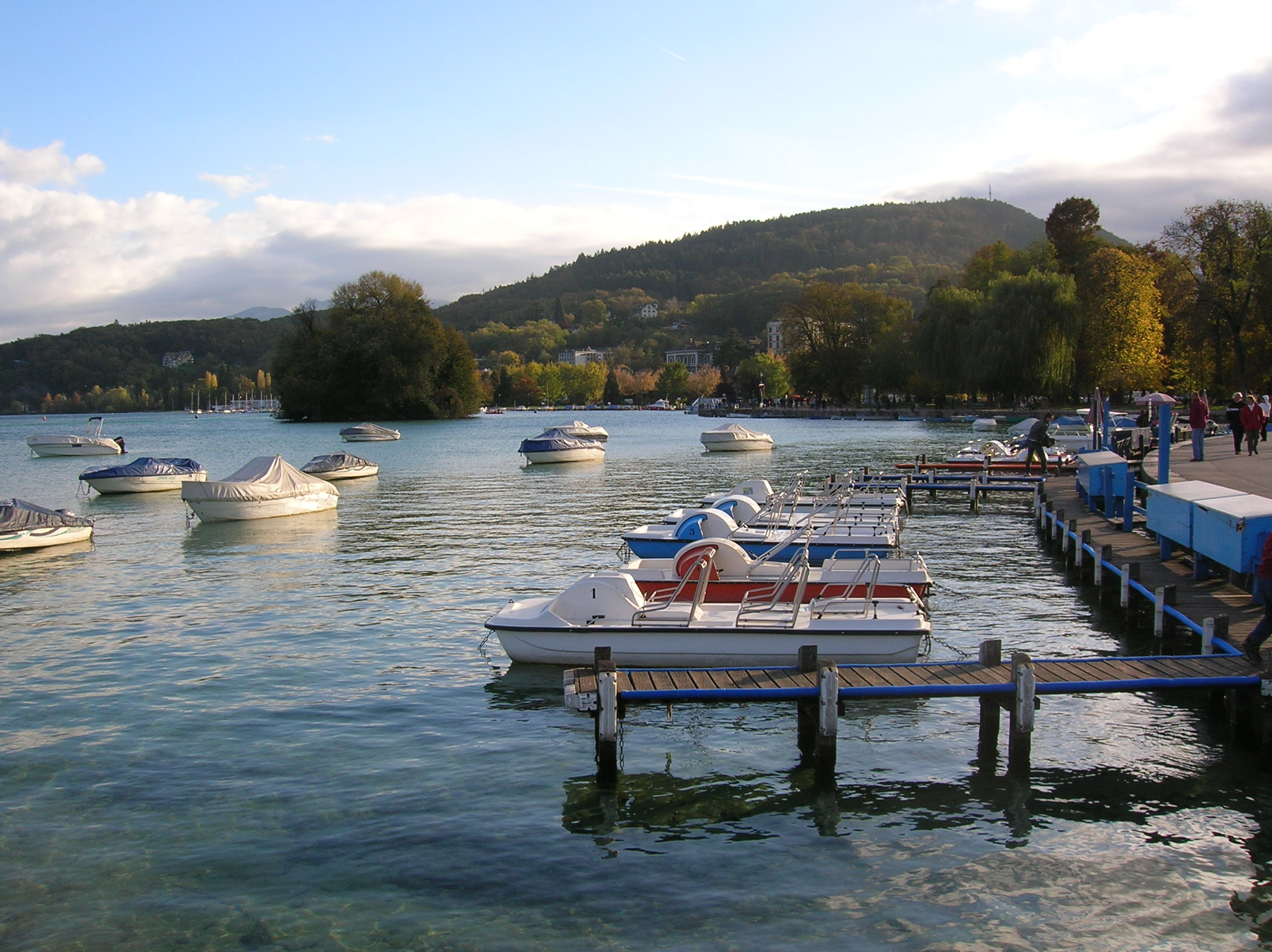 Débarcadère du Pâquier, Annecy, France (Jetty of Pâquier)